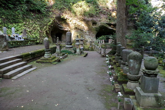 東慶寺住持の墓所。